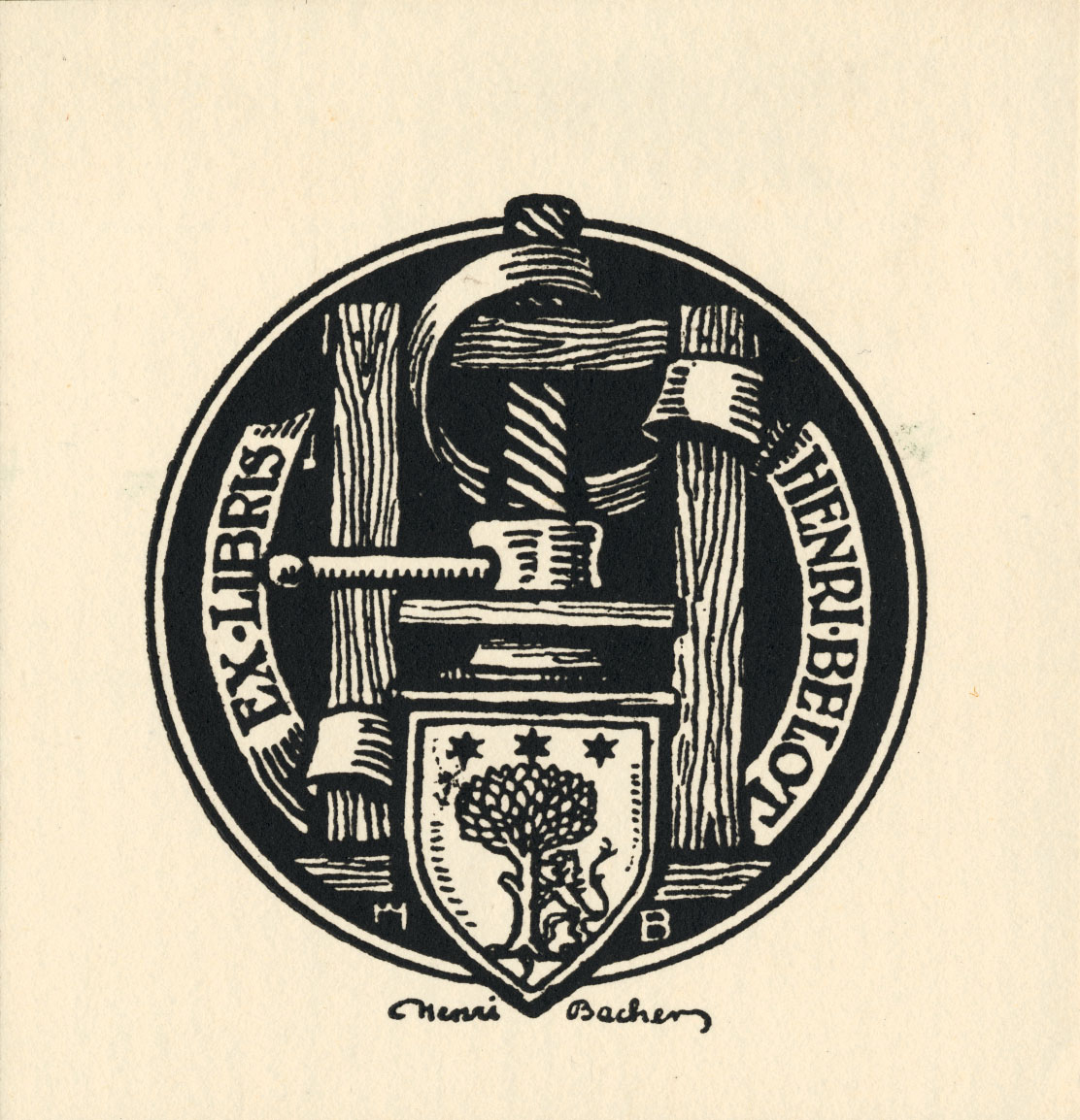 Ex libris Henri Belot